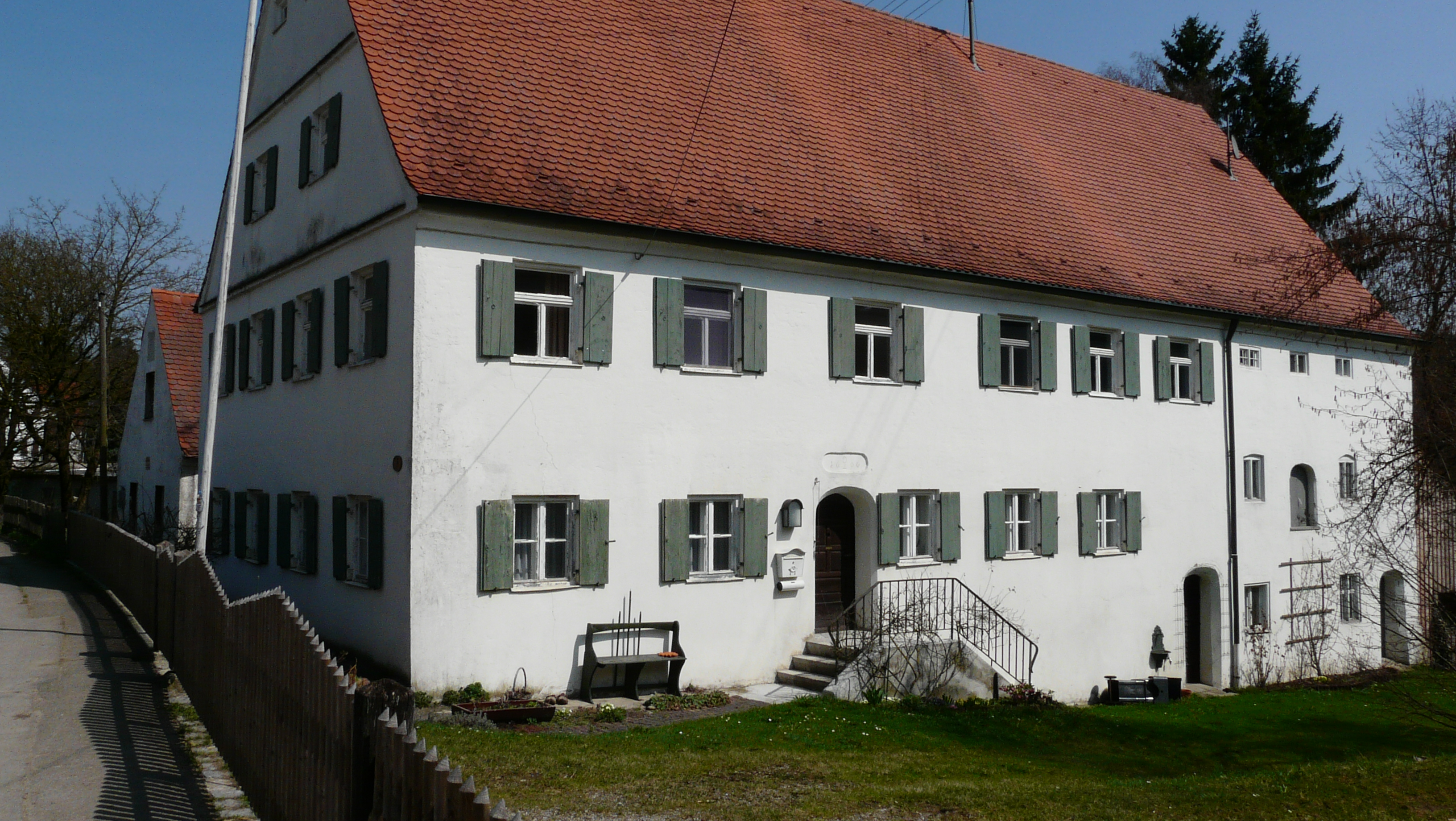 Wessobrunner Str. 7 in Döpshofen, Ortsteil von Gessertshausen